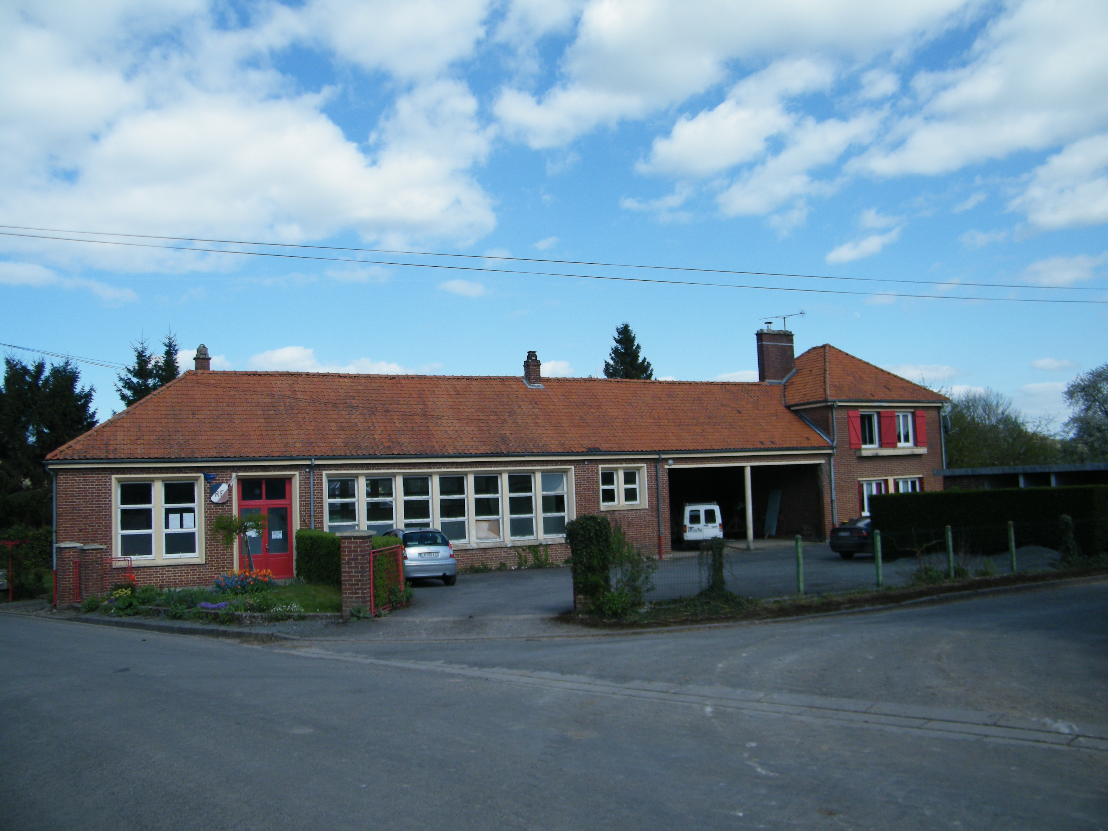 L'école.